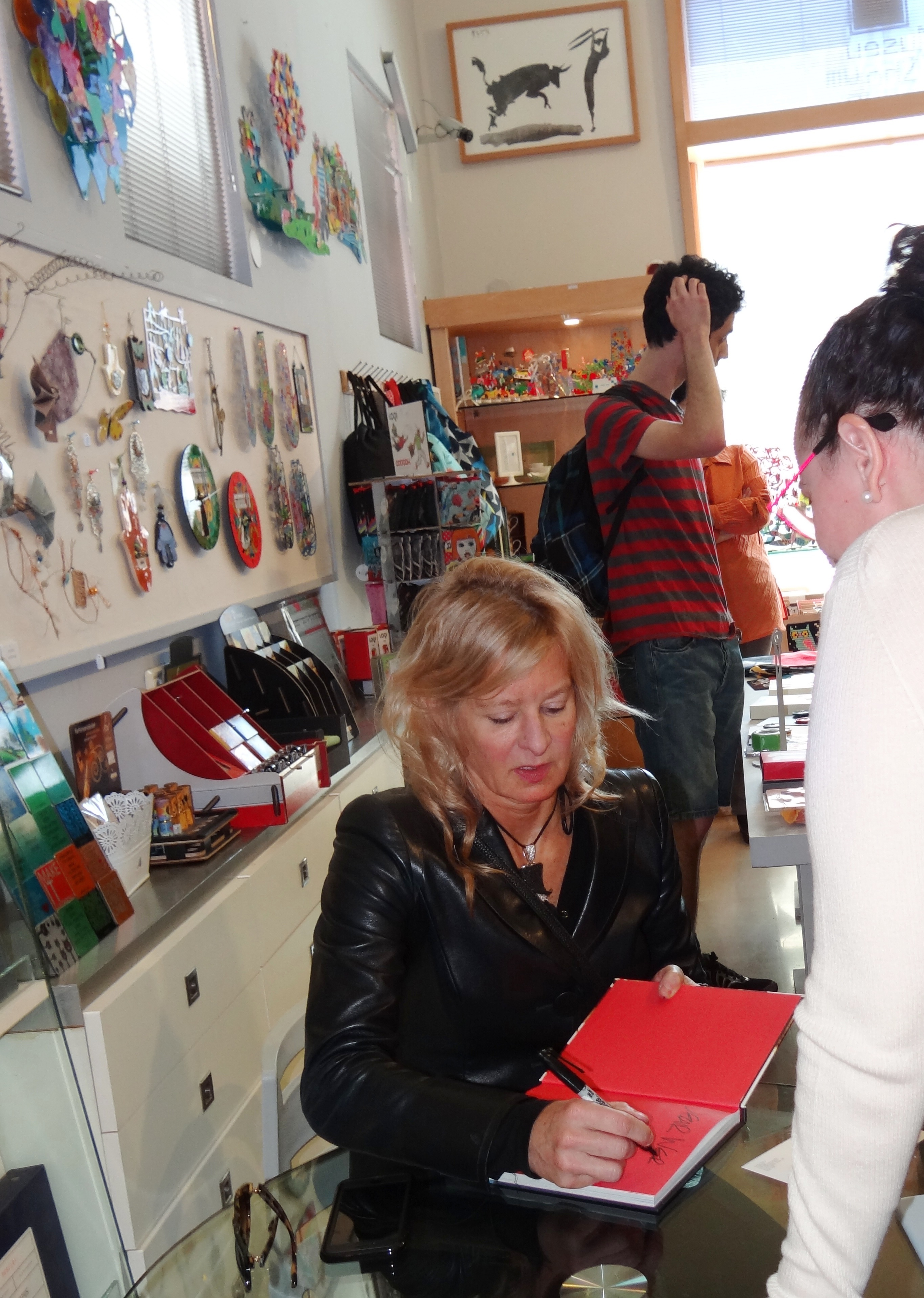 הצלמת והפסלת הבריטית אליסון ג'קסון חותמת על ספריהלאחר מפגש עם הקהל במוזיאון חיפה לאמנות שבו הציגה וסיפרה על עבודתה